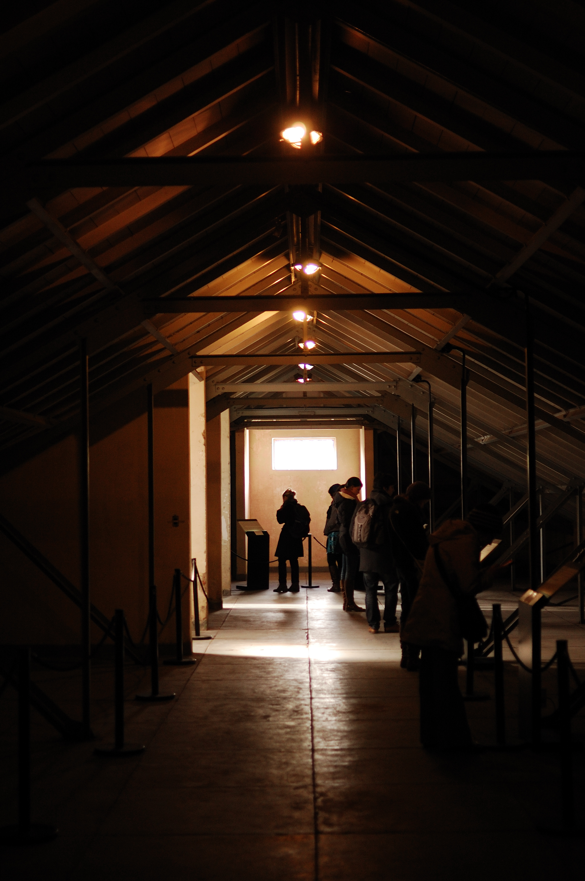 Editatón para la Memoria, organizada en conjunto por Wikimedia Argentina y el Espacio para la Memoria y los Derechos Humanos.